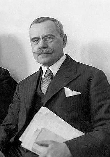 Profesor Bohdan Winiarski w kuluarach sejmowych.